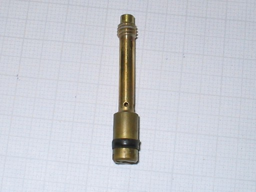 Getto per carburatori motociclistici a ghigliottina